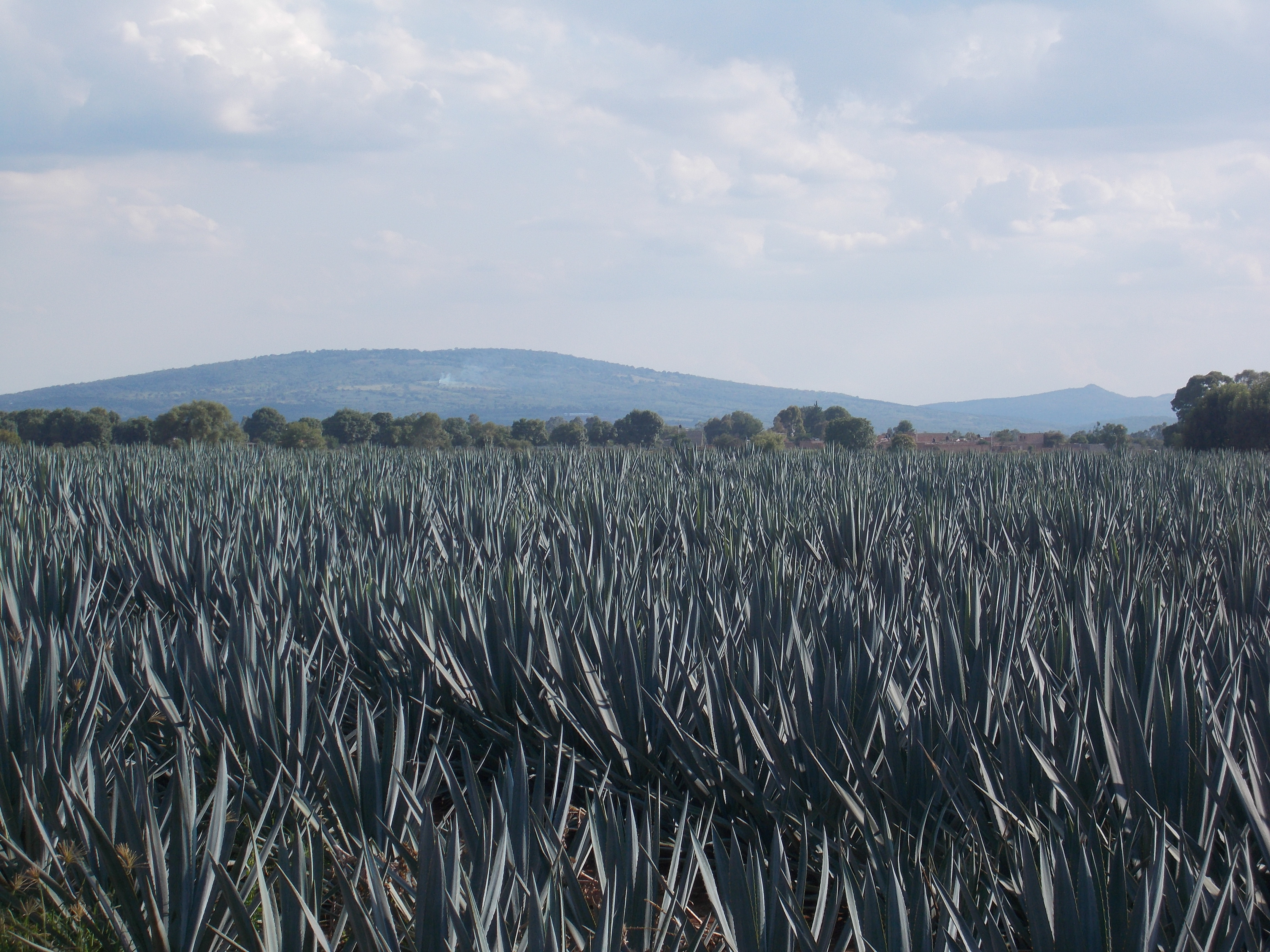 Campos de Agave Capilla de Guadalupe